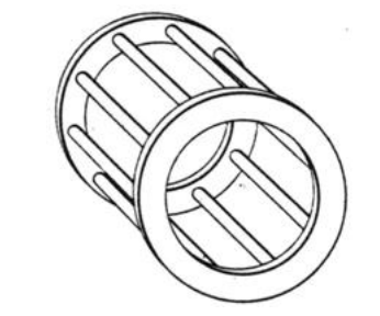 Urtxintxa kaiolako errotorea